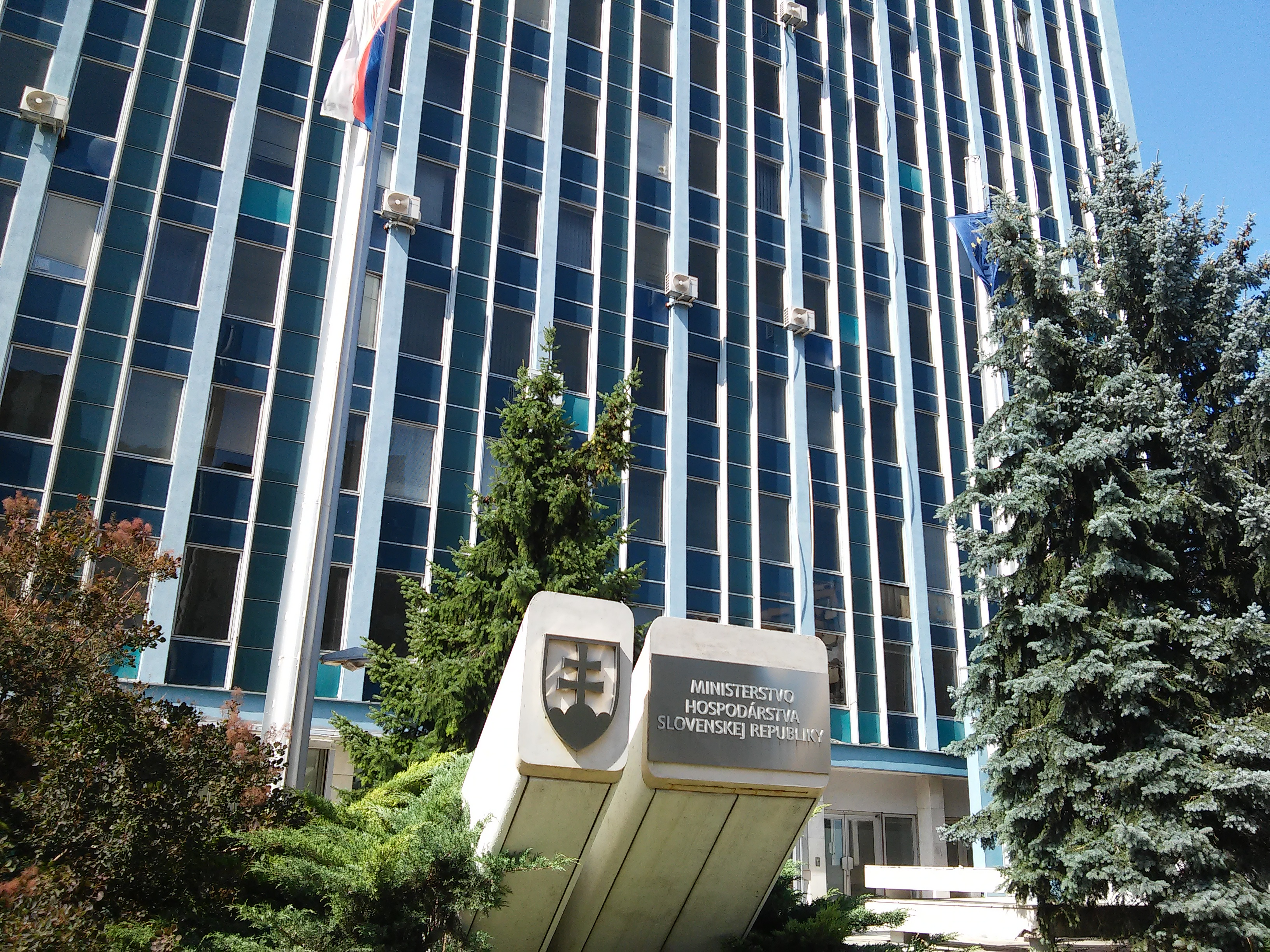 Mierová, Ružinov, Bratislava